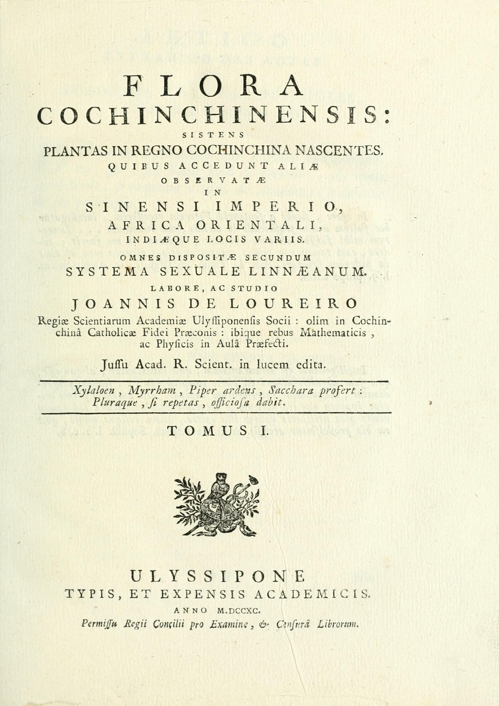 Page titre de la Flora Cochinchinensis de João de Loureiro